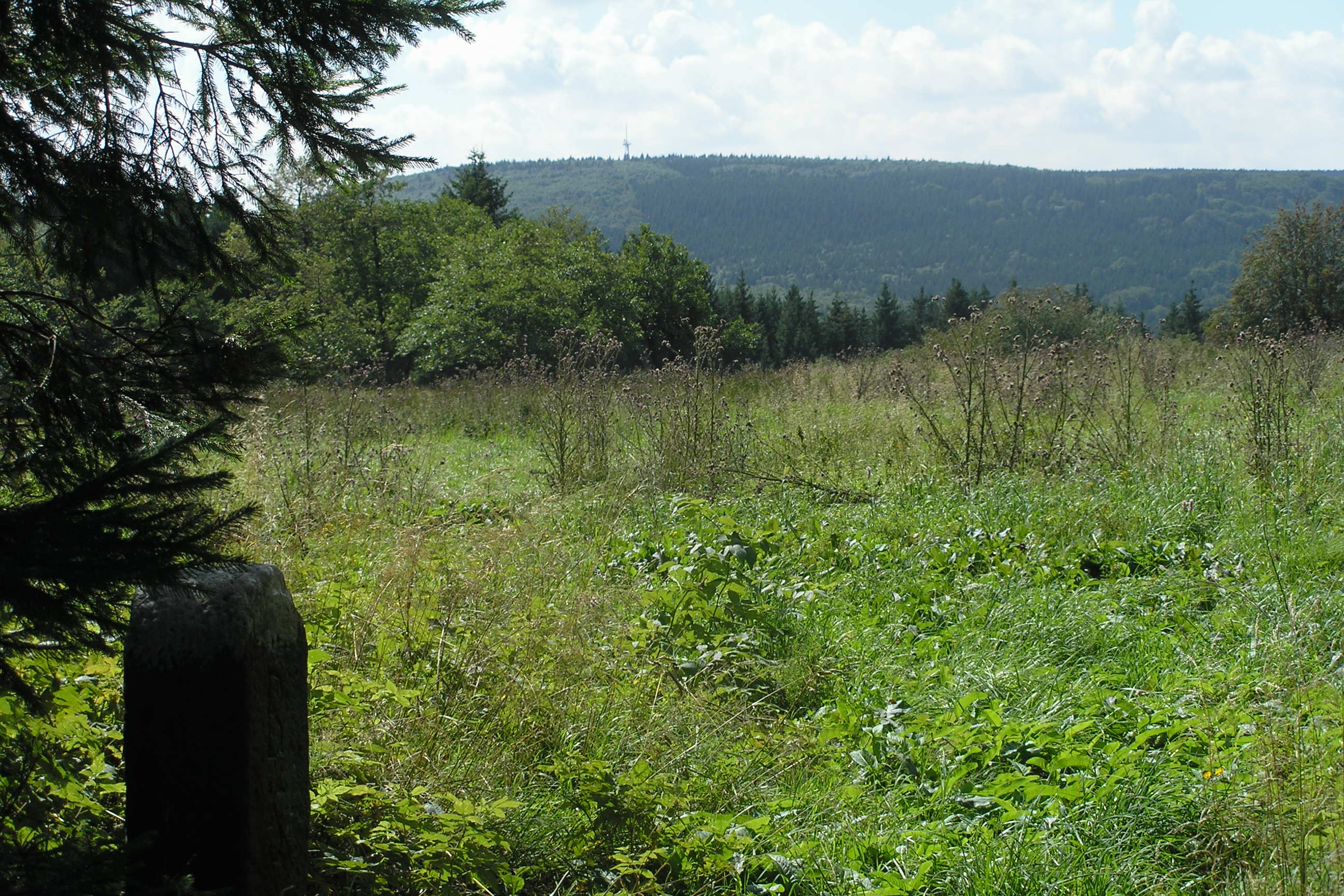 In der Umgebung der Kissinger Hütte auf dem Feuerberg, Blick hinüber zum Totnansberg